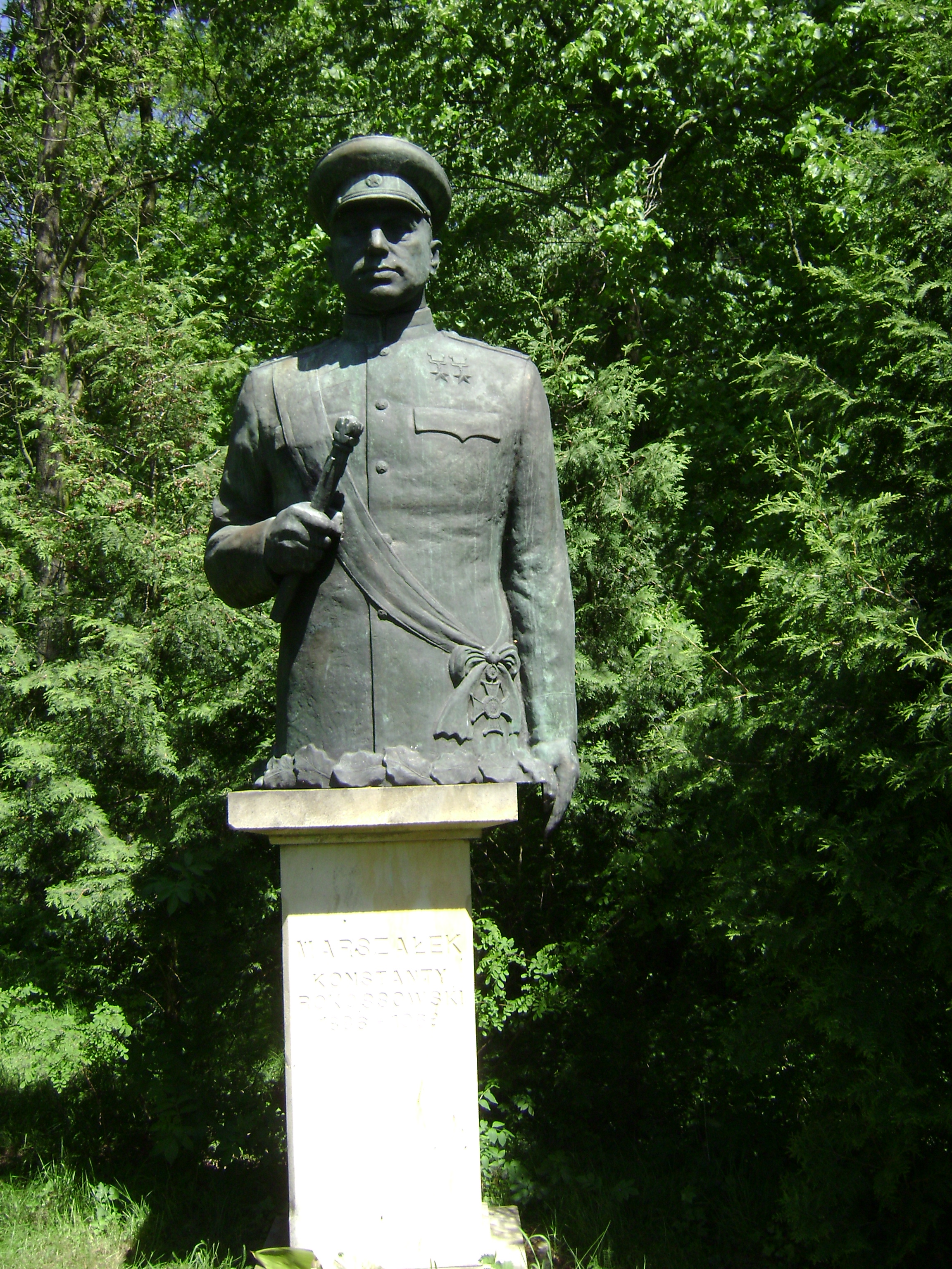 Pomnik marszałka Polski i ZSRR Konstantego Rokossowskiego w Muzeum Armii Czerwonej i Wojska Polskiego w Uniejowicach.